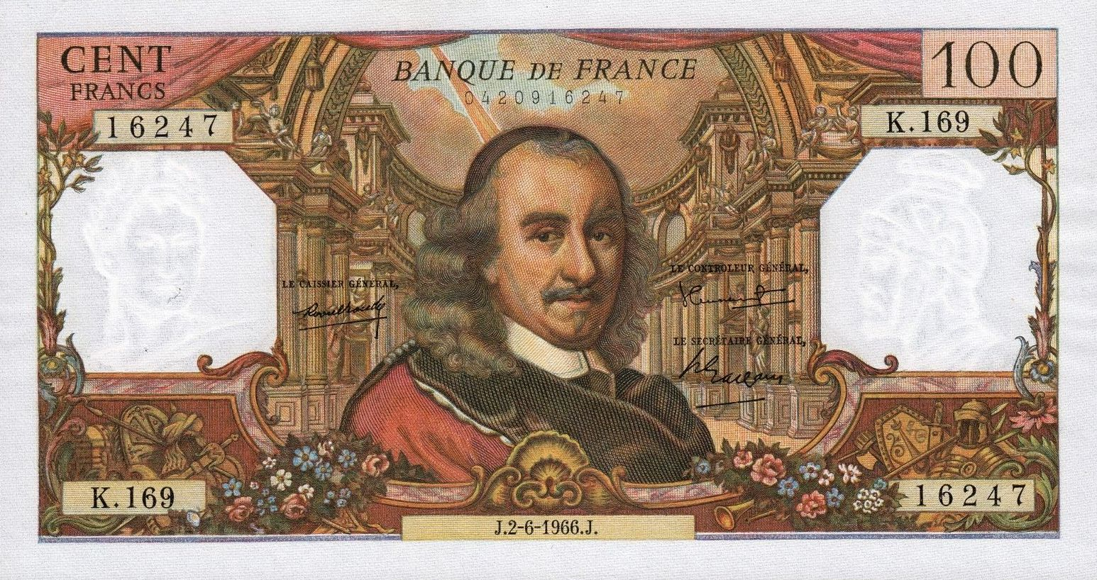 100 francia frank 1966.06.02. Corneille-típus.